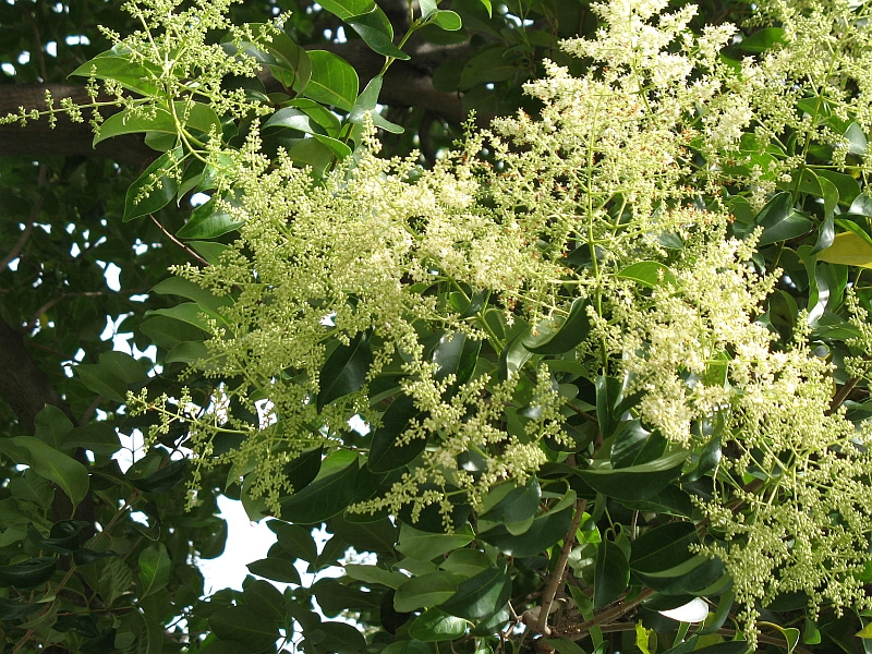 Copa de Ligustrum lucidum florido.